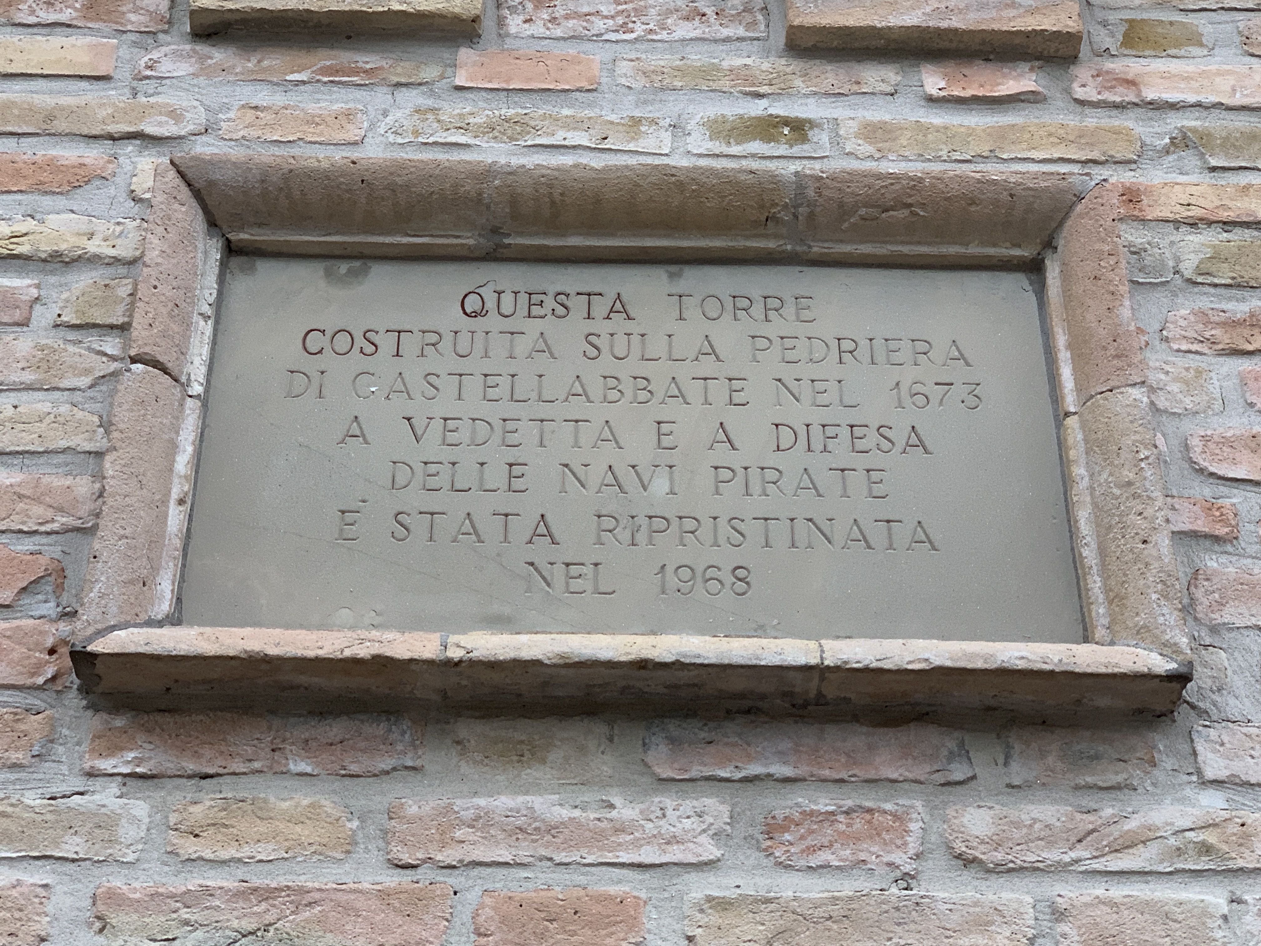 Effige della Torre di Torre Pedrera